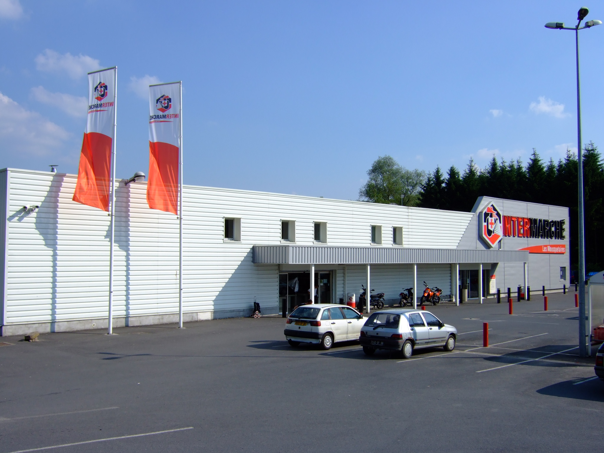 Le supermarché Intermarché avenue Blanqui à Levrézy (Bogny-sur-Meuse)